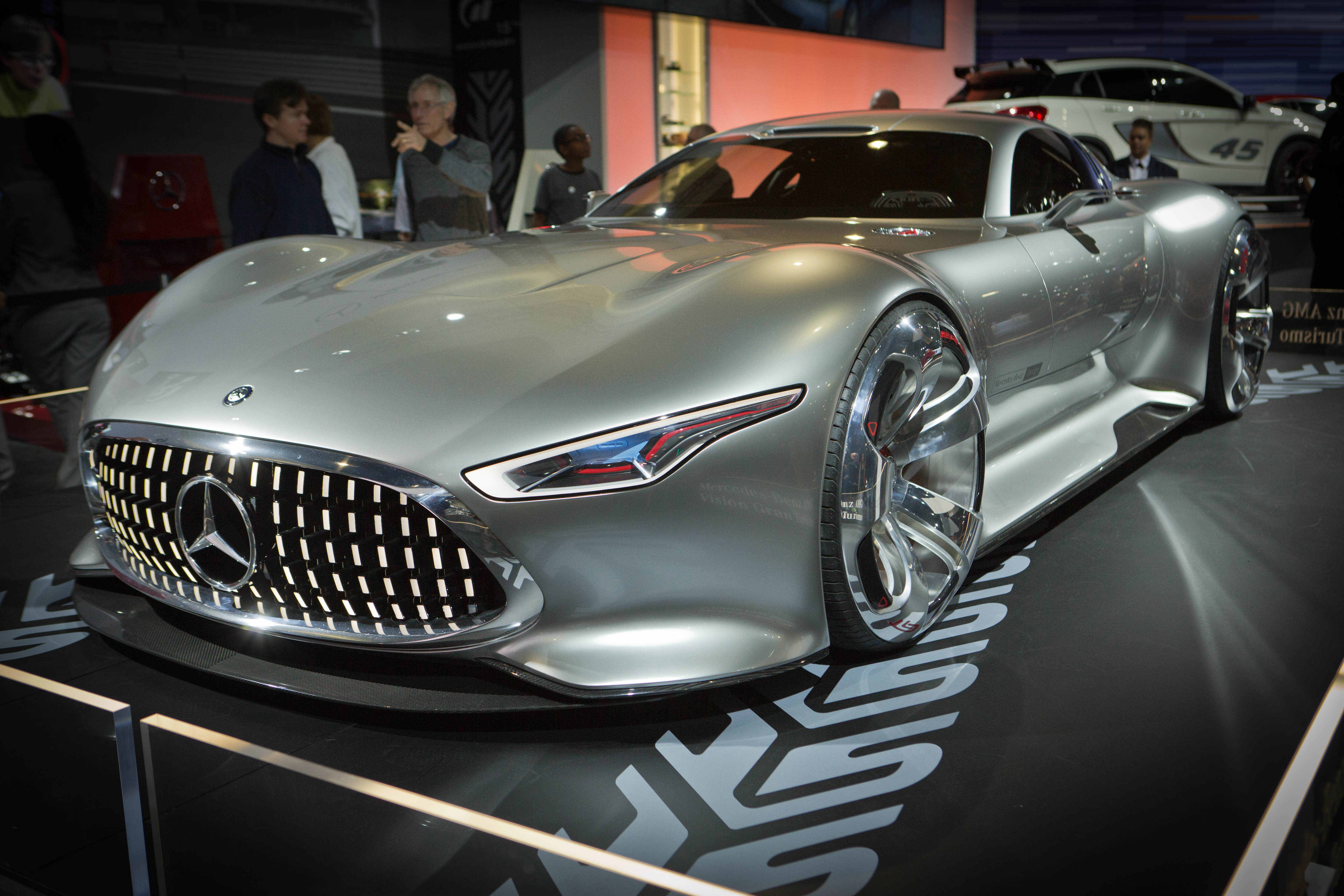 Mercedes-Benz AMG Vision Gran Turismo на выставке